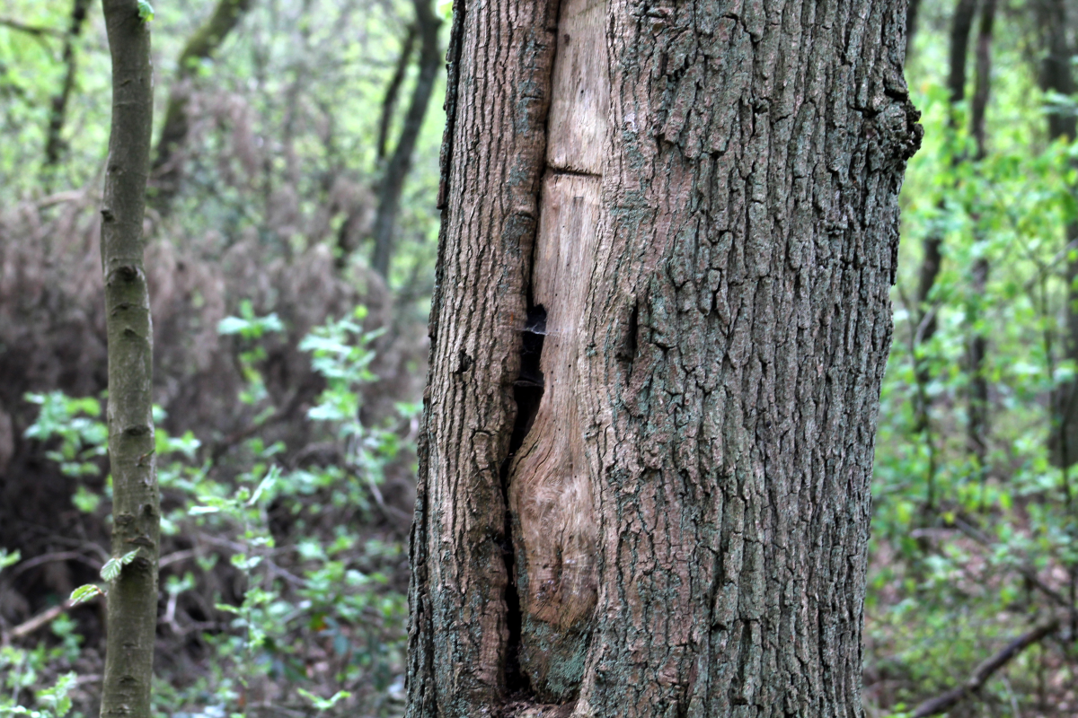 Boomholte